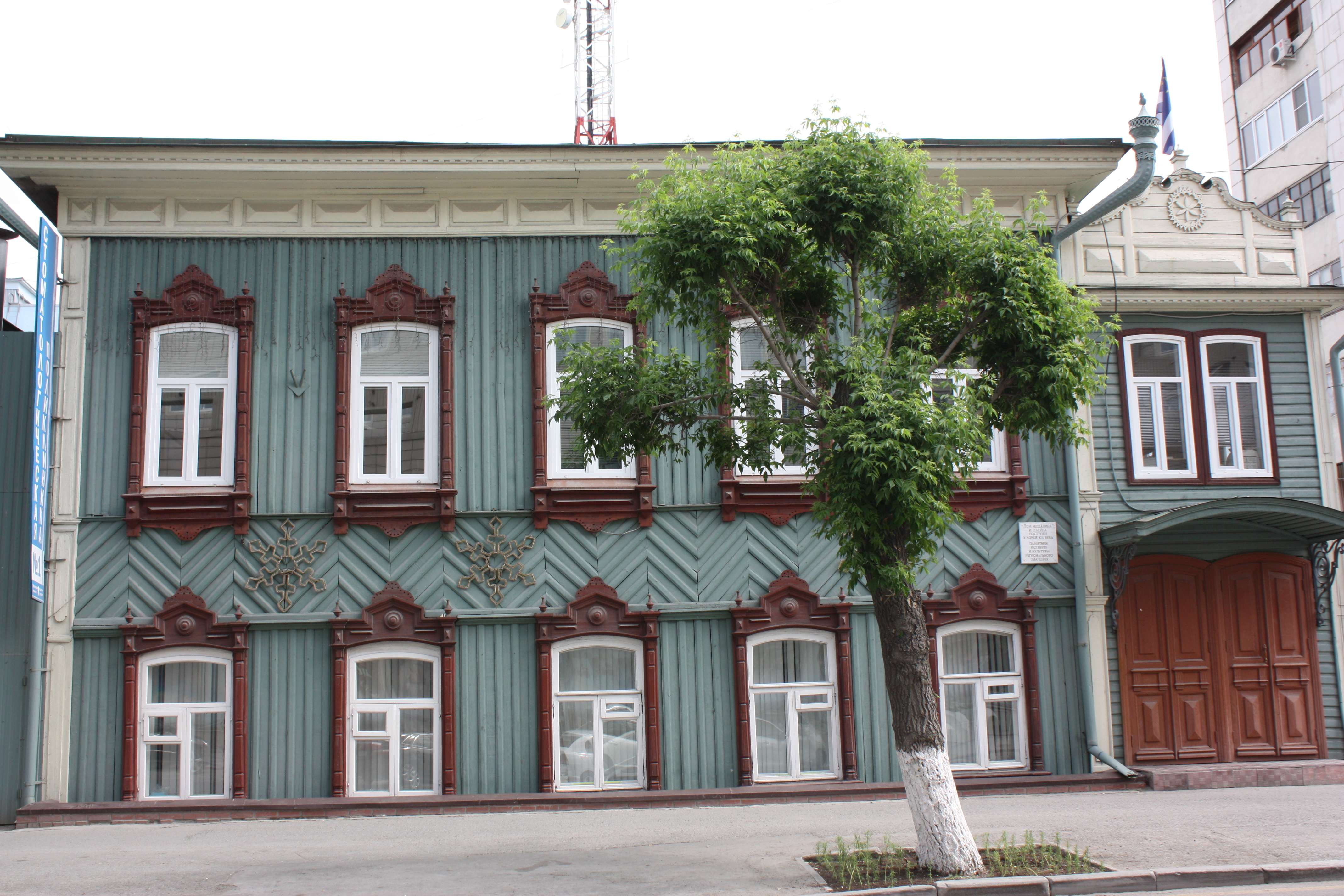 Особняк И.С. Бейна, улица Ленина, 49, Тюмень, Тюменская область